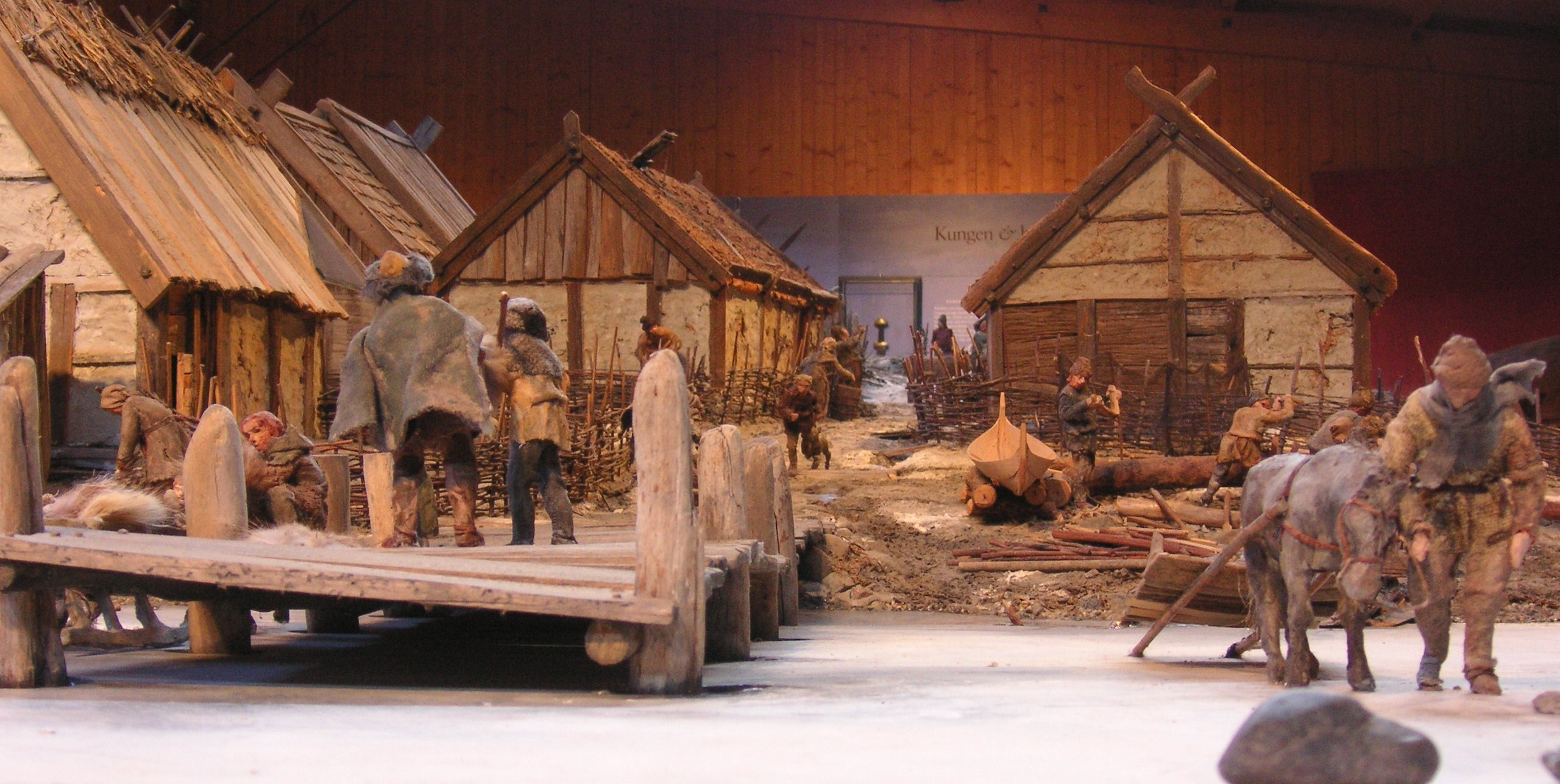 Birka, Sweden, modell